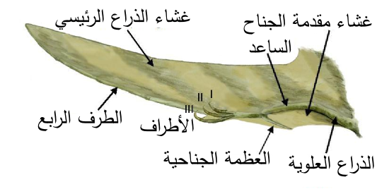 رسم لجناح تيروصور، أي زاحف مُجنَّح. مرسومة بالرصاص وملونة رقميًّا.